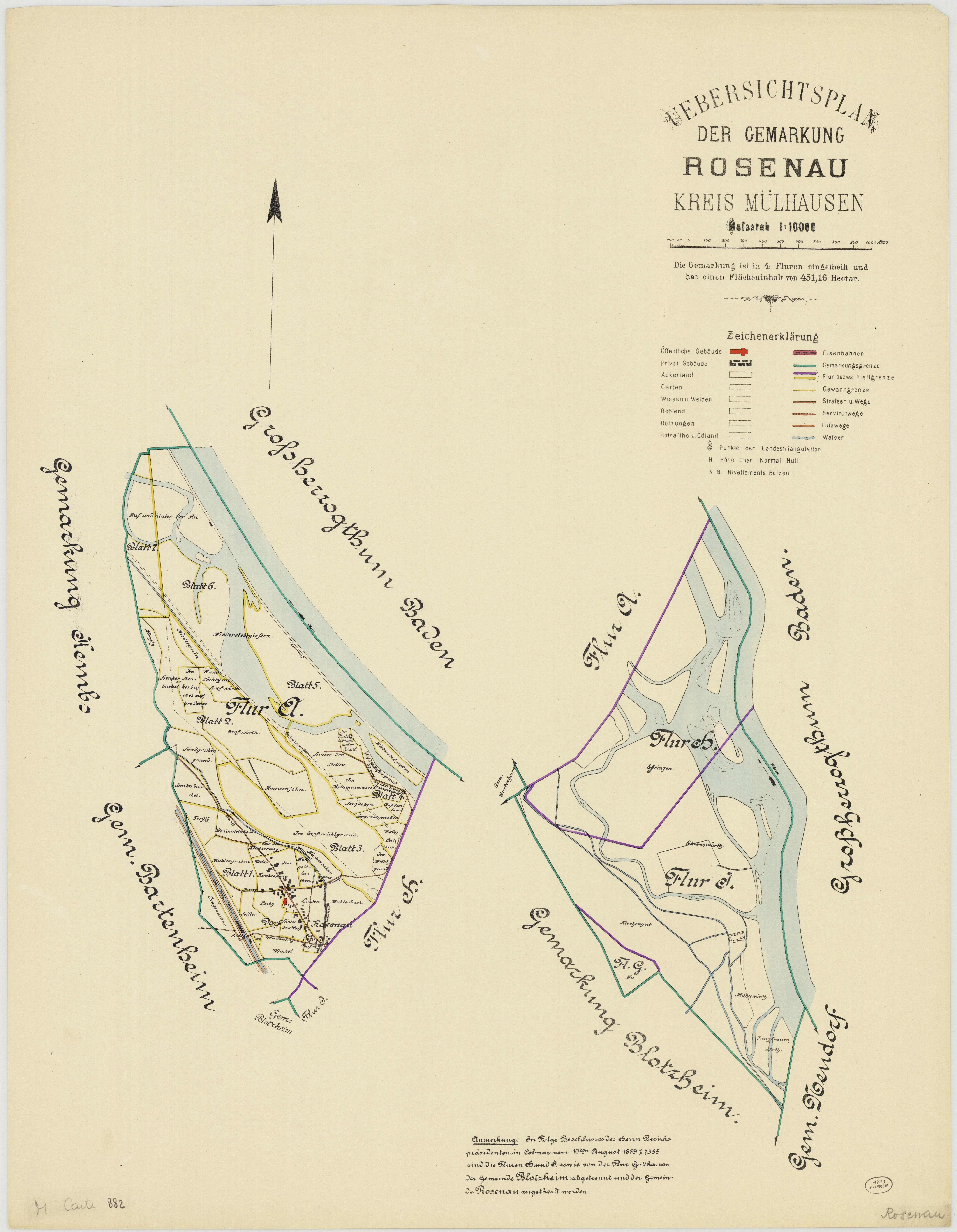 Plan der Gemarkung der Gemeinde Rosenau (1901)